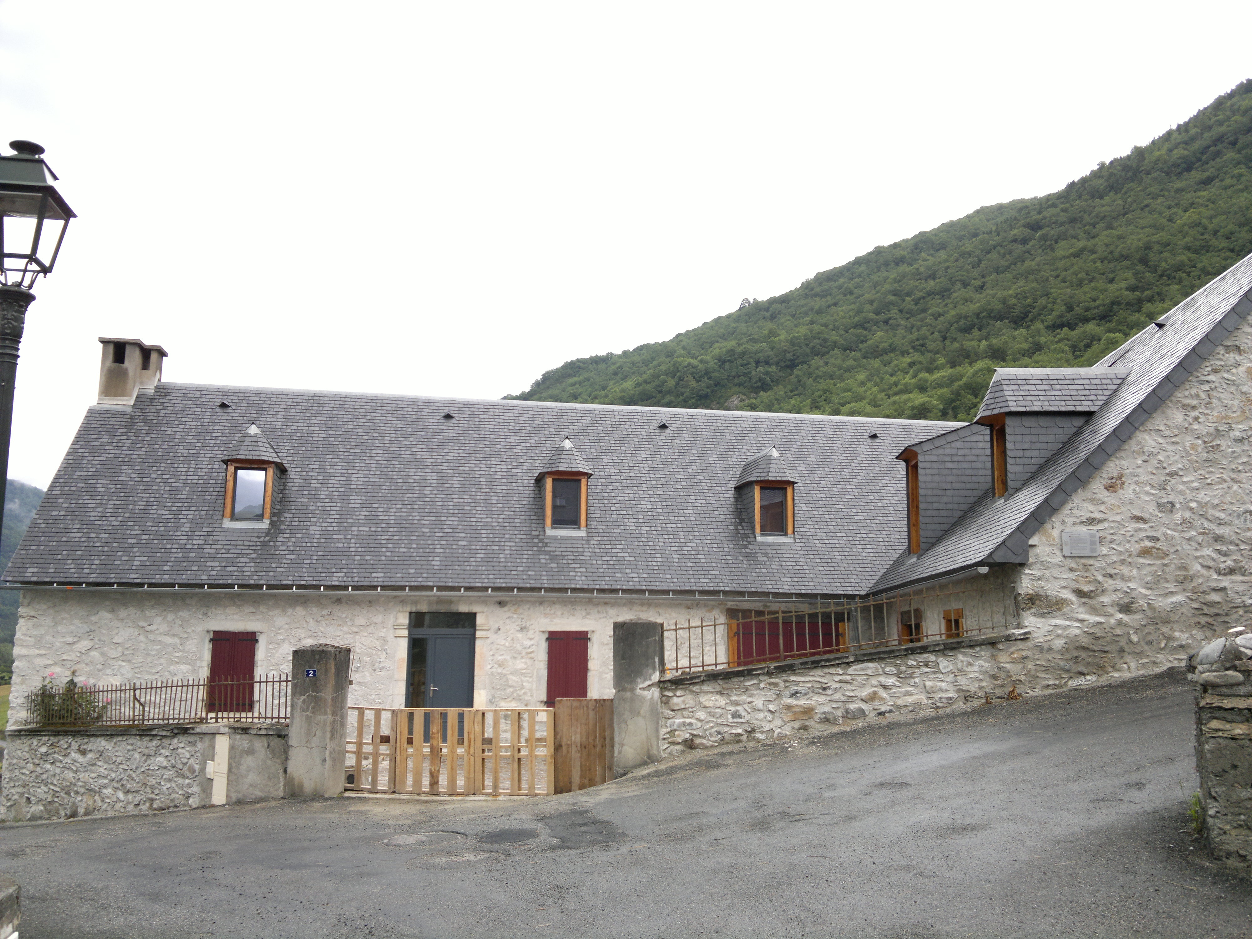 Maison Rouys (XIX°), Fr-65-Grézian.